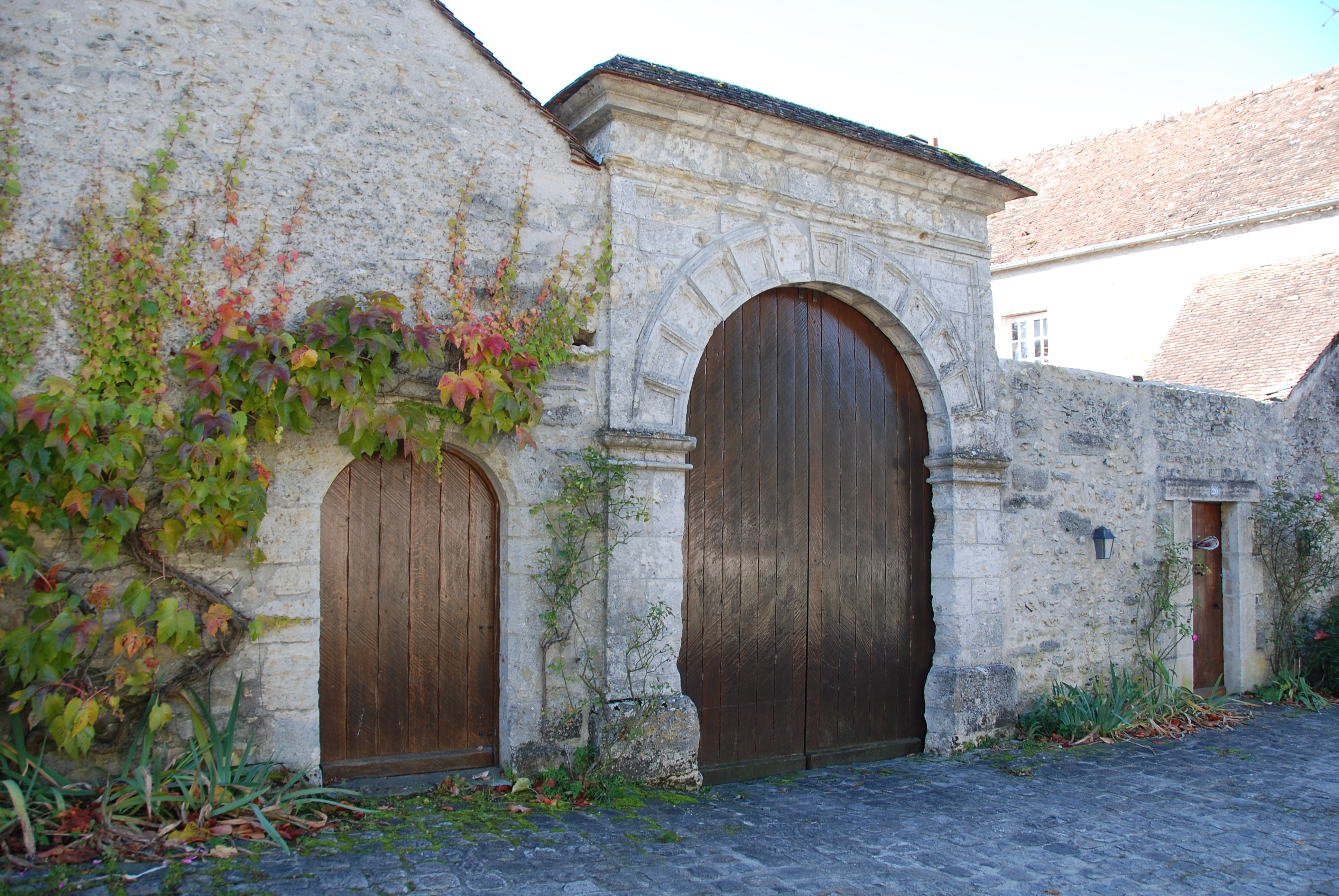 Portail 20, rue de Nemours, XVIIe siècle. (Ury, Seine-et-Marne, région Île-de-France).